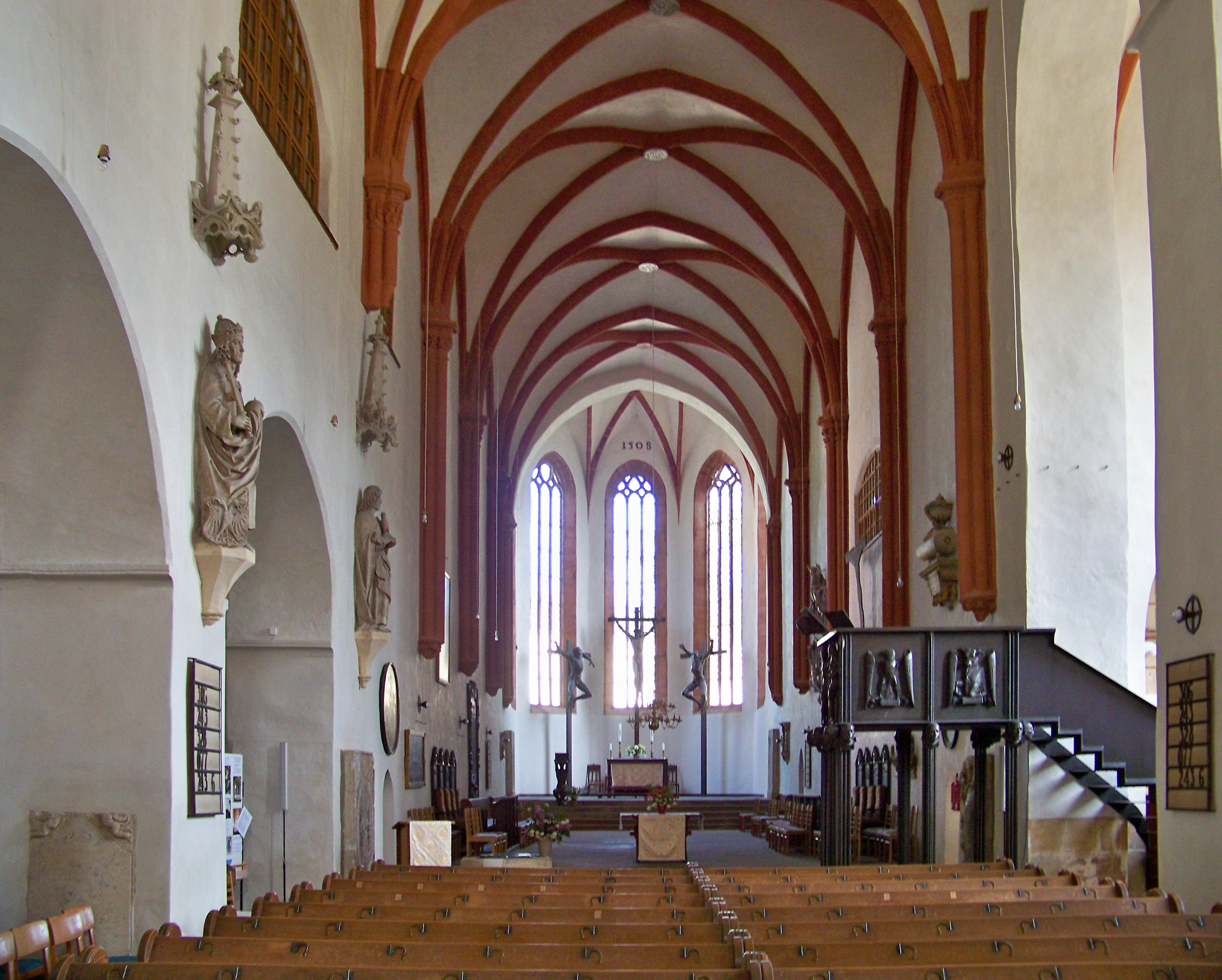 Innenraum des Wurzener Doms